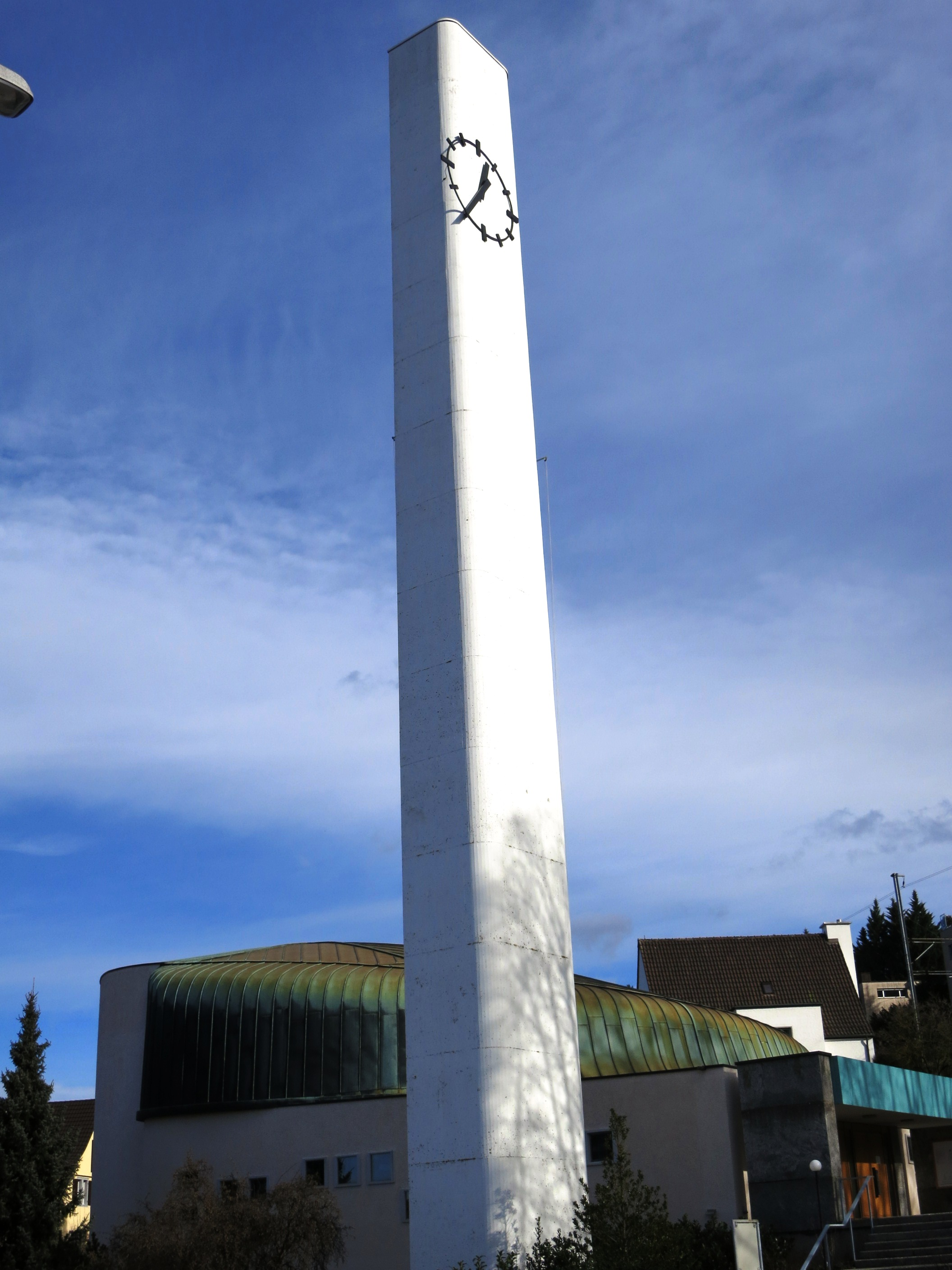 Katholische Kirche, Schlieren ZH, Schweiz